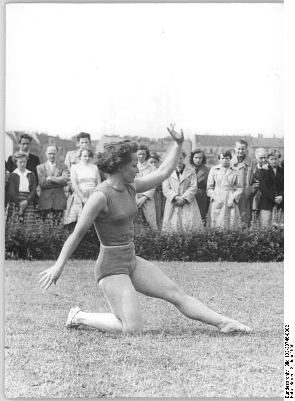 Helga Speck Zentralbild Beyer 3.6.1956 Bezirksmeisterschaften im Turnen Am Sonntag, dem 3.6.1956, wurden im Berliner Friedrich-Ludwig-Jahn-Sportpark die Berliner Bezirksmeisterschhaften im Geräteturnen ausgetragen. Während die Männer den olympischen Zwölfkampf turnten, ging es bei den Frauen um den olympischen Achtkampf. UBz: Eine der aussichtsreichsten Kandidatinnen, Helga Speck (Vorwärts), bei ihrer Kürübung im Bodenturnen.